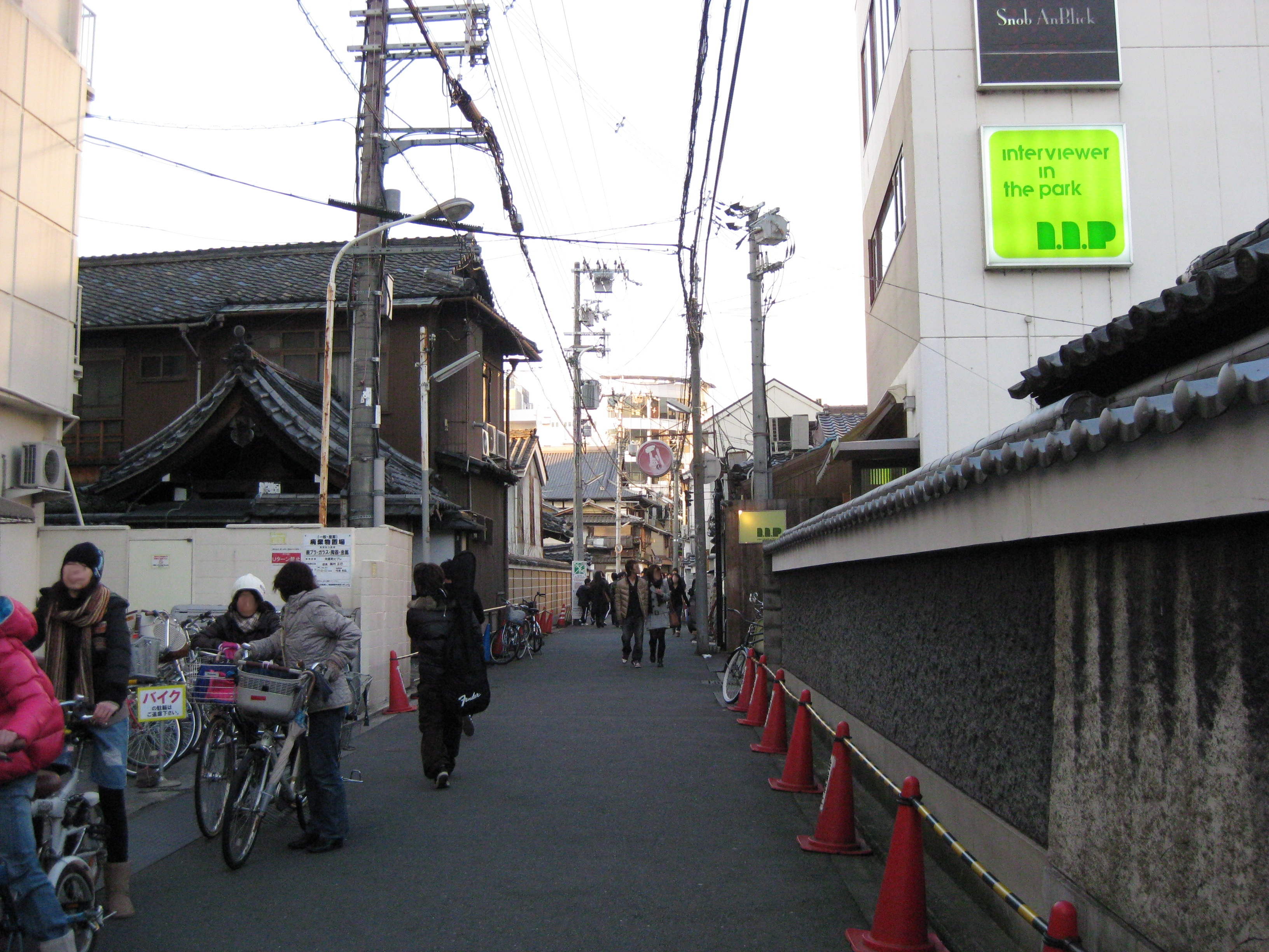 裏寺町通 蛸薬師通との交差点付近から北方面